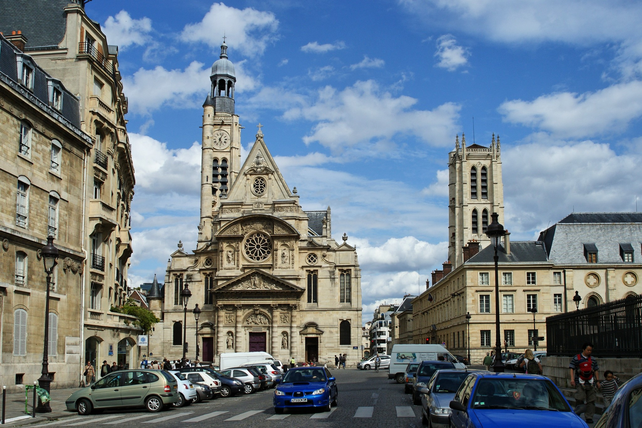 Deux monuments de Paris (5ième) - A gauche l'Eglise Saint Etienne du Mont , à droite le lycée Henri IV avec la Tour CLOVIS .